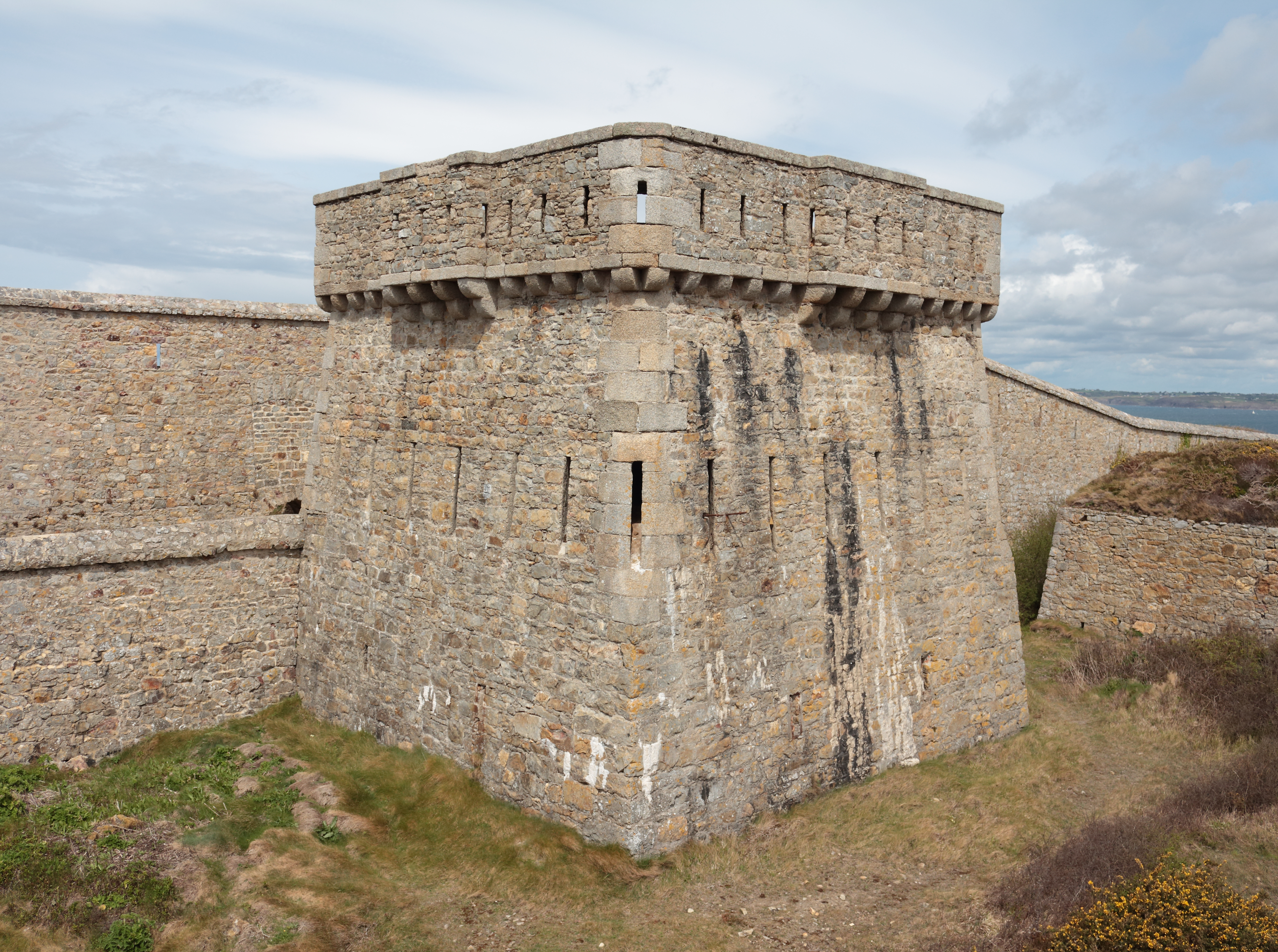 Tour modèle n°3 du fort du Toulinguet, Camaret-sur-Mer, Finistère, Bretagne, France.